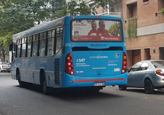 Culata de una de las unidades afectadas a la línea Ronda Cultural.